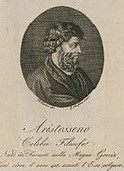 Portrait (imaginaire) d'Aristoxène de Tarente par A. Pasten, gravure de Guglielmo Morghen